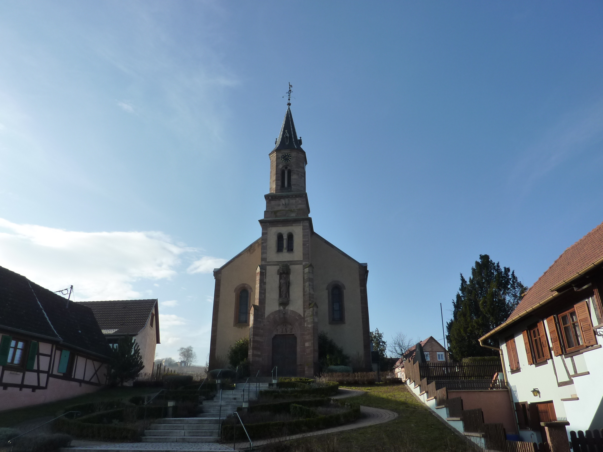 Église Saint-André d'Eichoffen